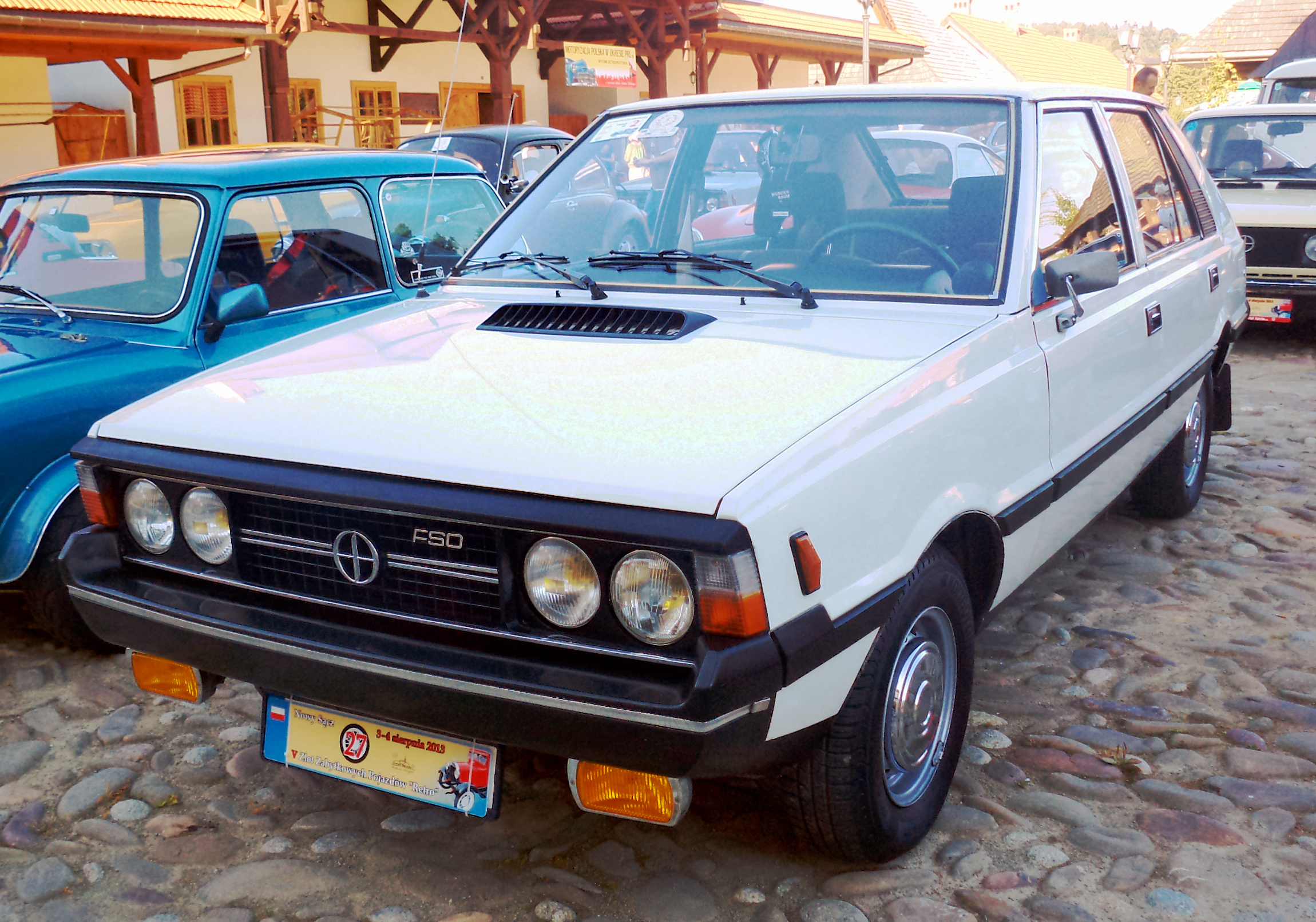 FSO Polonez MR'78 podczas V Zlotu Samochodów Zabytkowych "Retro" w Nowym Sączu.